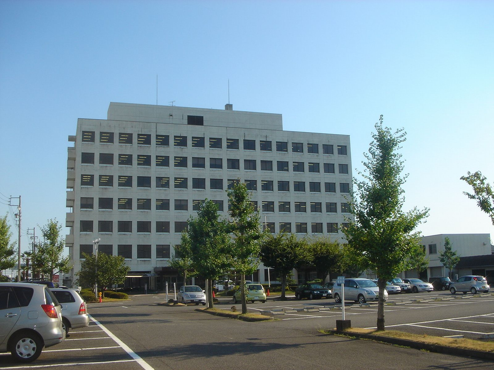 （岐阜県農業・福祉会館）,Gifu,Gifu,Japan(岐阜県岐阜市)で撮影。